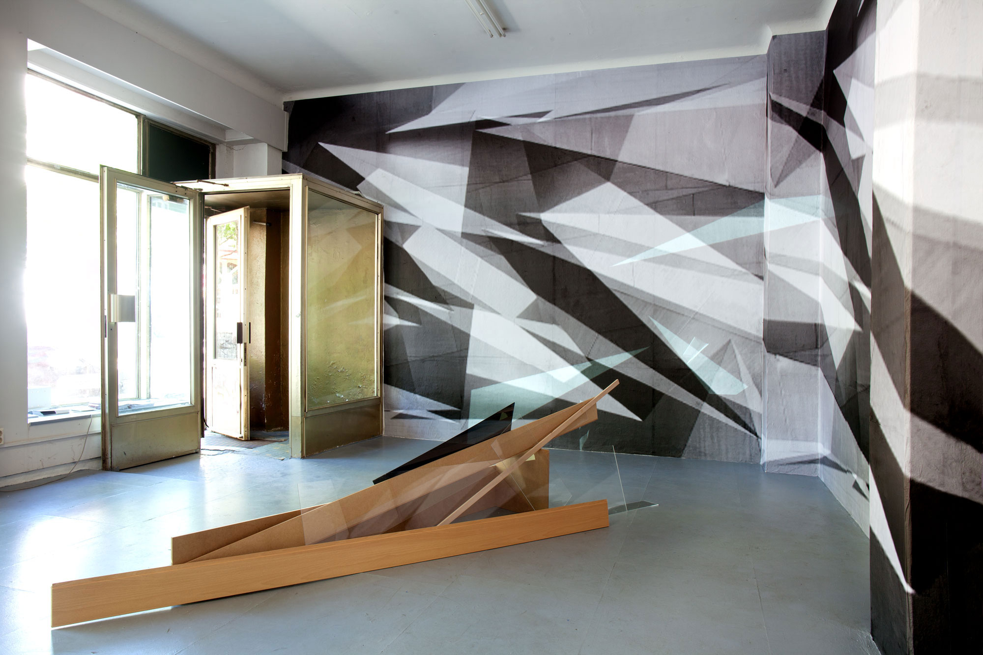 Bei der Fotografie handelt es sich um eine Dokumentation der Ausstellung "Post Privacy" (2014) von Astrid Busch (Berlin) im Kunstraum NeuDeli, dem Ausstellungsort des Leipziger Kunstvereins Delikatessenhaus e.V.. Die Künstlerin schuf eine ortsspezifische Installation.